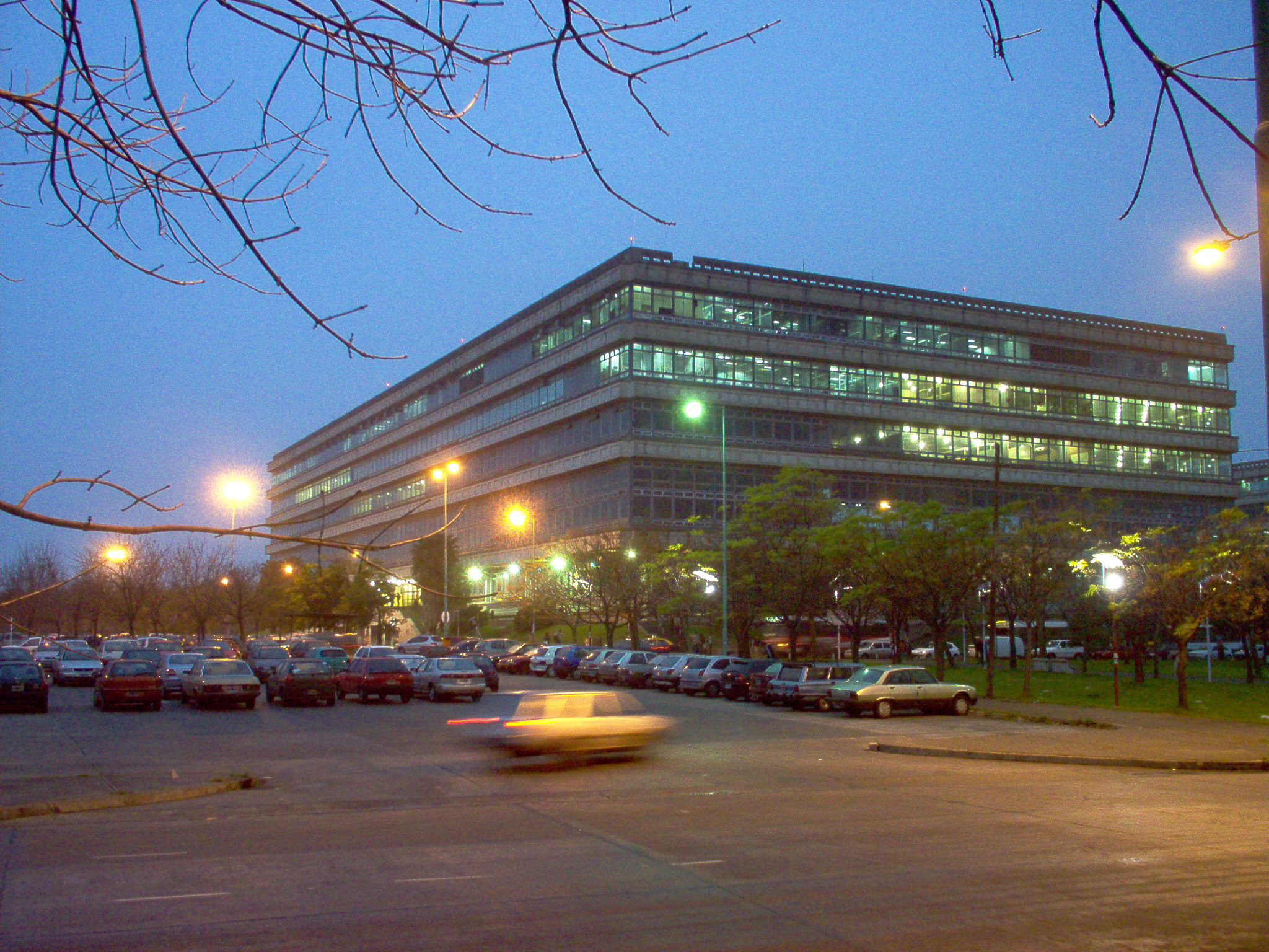 Vista del Pabellón III de la Ciudad Universitaria de Buenos Aires, sede de la Facultad de Arquitectura, Diseño y Urbanismo (FADU) de la Universidad de Buenos Airesfadu